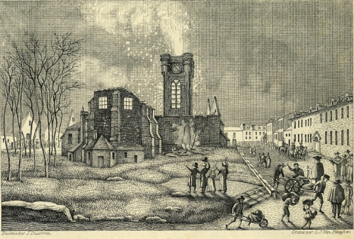 Incendie de lÉglise Saint-Julien d'Ath le 10 avril 1817